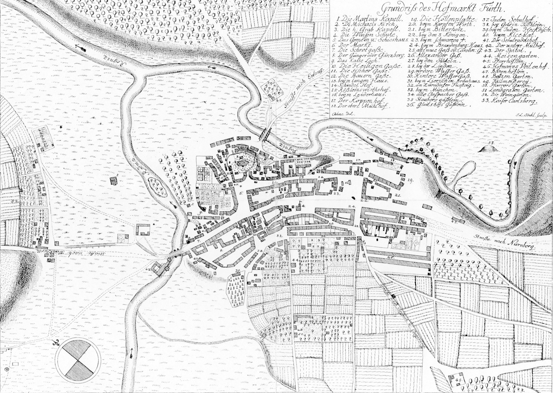 Karte von Fürth aus dem Jahre 1789